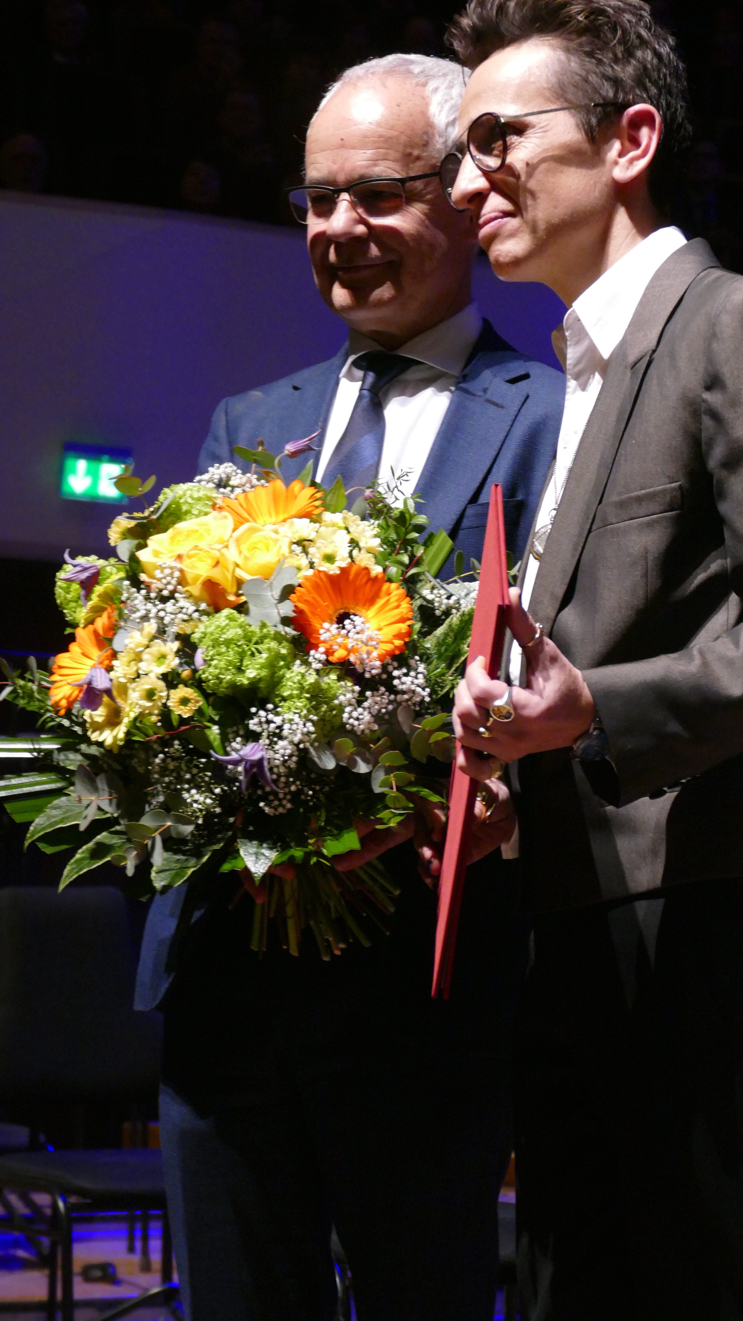 Der Vorsteher des Börsenvereins des Deutschen Buchhandels Heinrich Riethmüller überreicht den Leipziger Buchpreis zur Europäischen Verständigung 2019 an die Autorin Masha Gessen. (Ort: Gewandhaus Leipzig, Eröffnungsveranstaltung der Leipziger Buchmesse 2019)